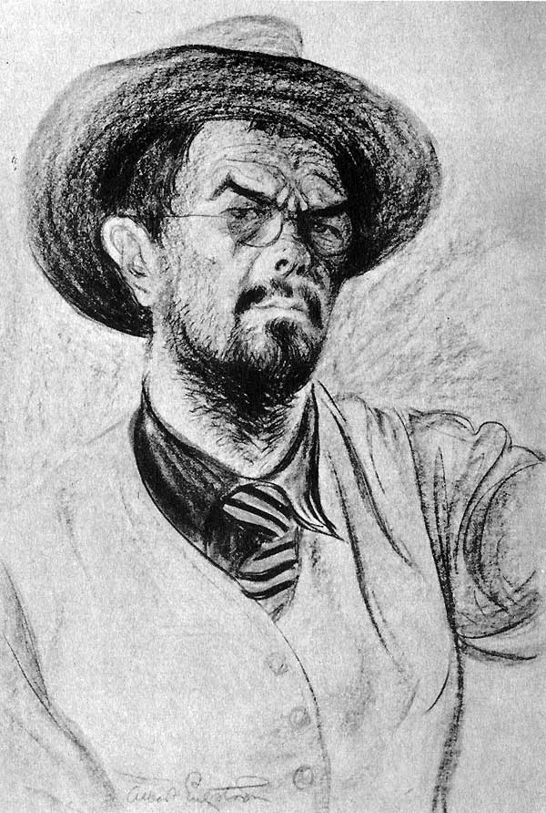 Albert Engström, self-portrait